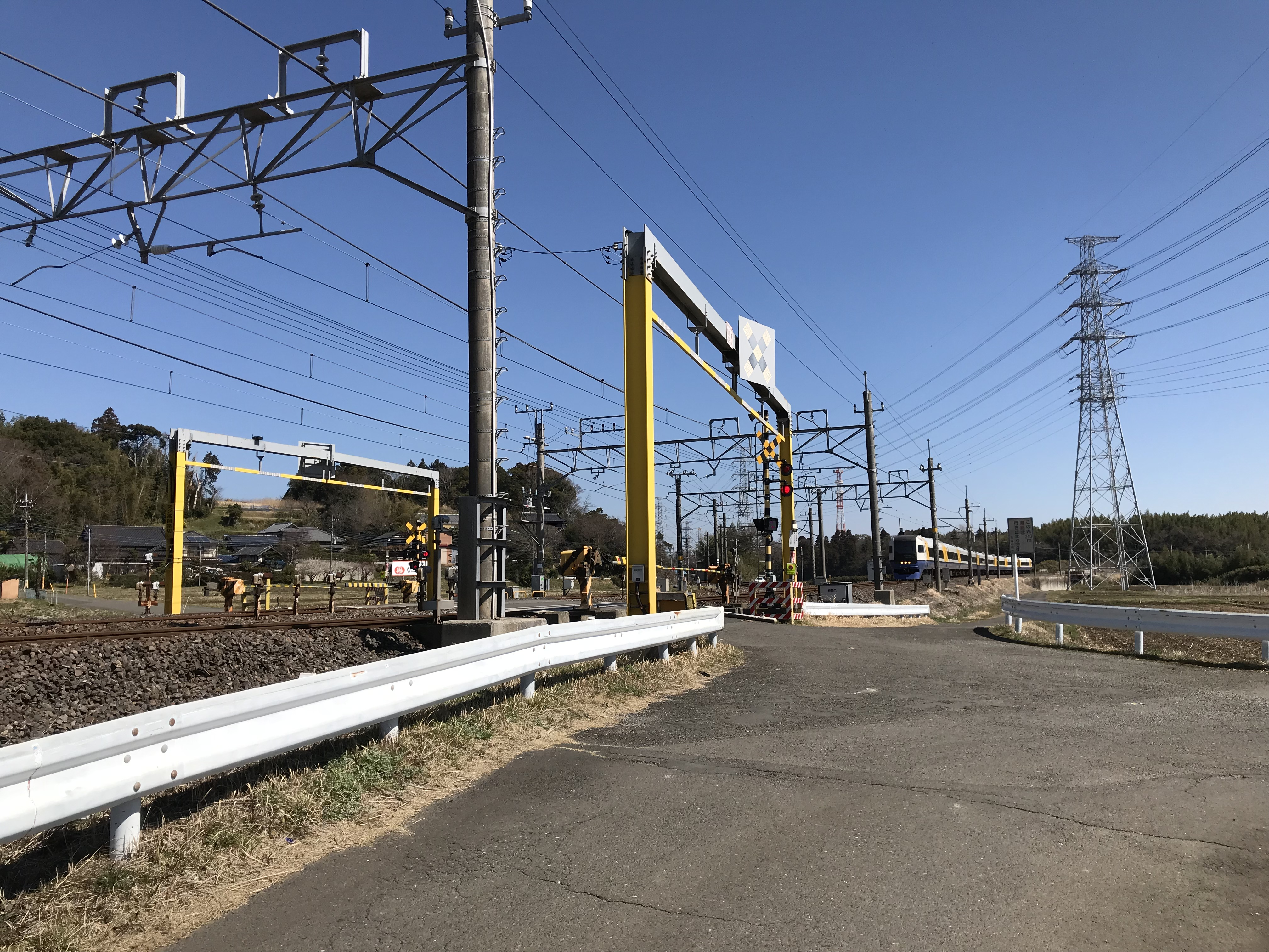 成田線と総武線本線の分岐点を踏切から撮影